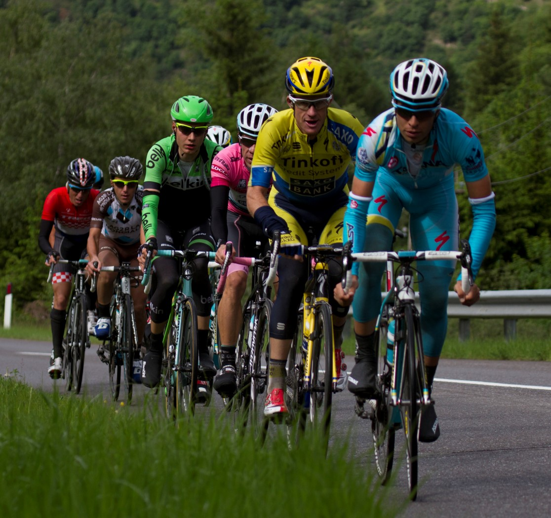 043 roze trui groep met aru rogers kelderman pozzovivo kiserlovski